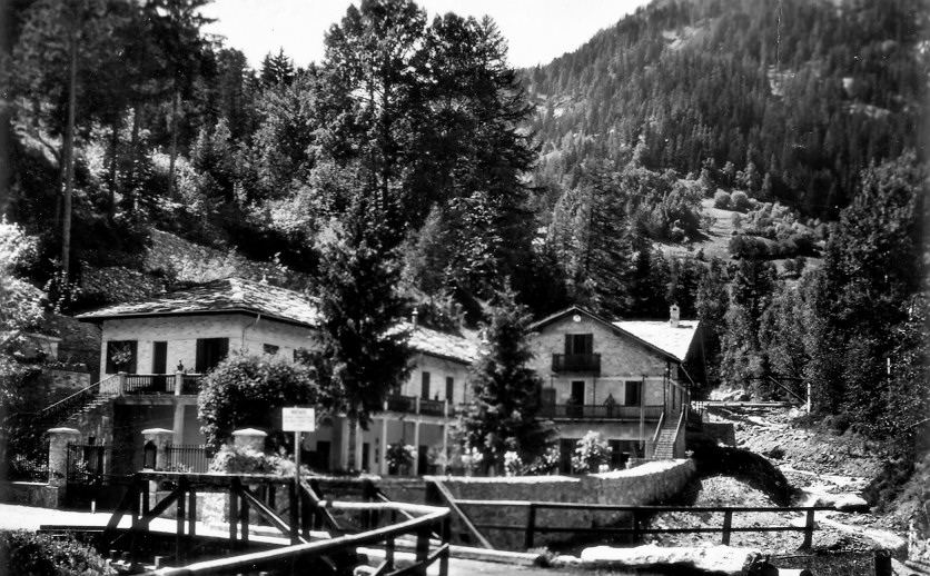 קאורמיאר רישיון באתר האיטלקי מציינים שיש בעיה עם העלאת תמונה זו במדינות אחרות היות והתמונה היא משנת 1934 לא נראה לי הדבר קריטי. אם מישהו גבור אחרת, יקרא את החומר, חלקו באנגלית ואם ישכתנע, יסיר את התמונה. התמונה מעניינית אבל לא קריטית.